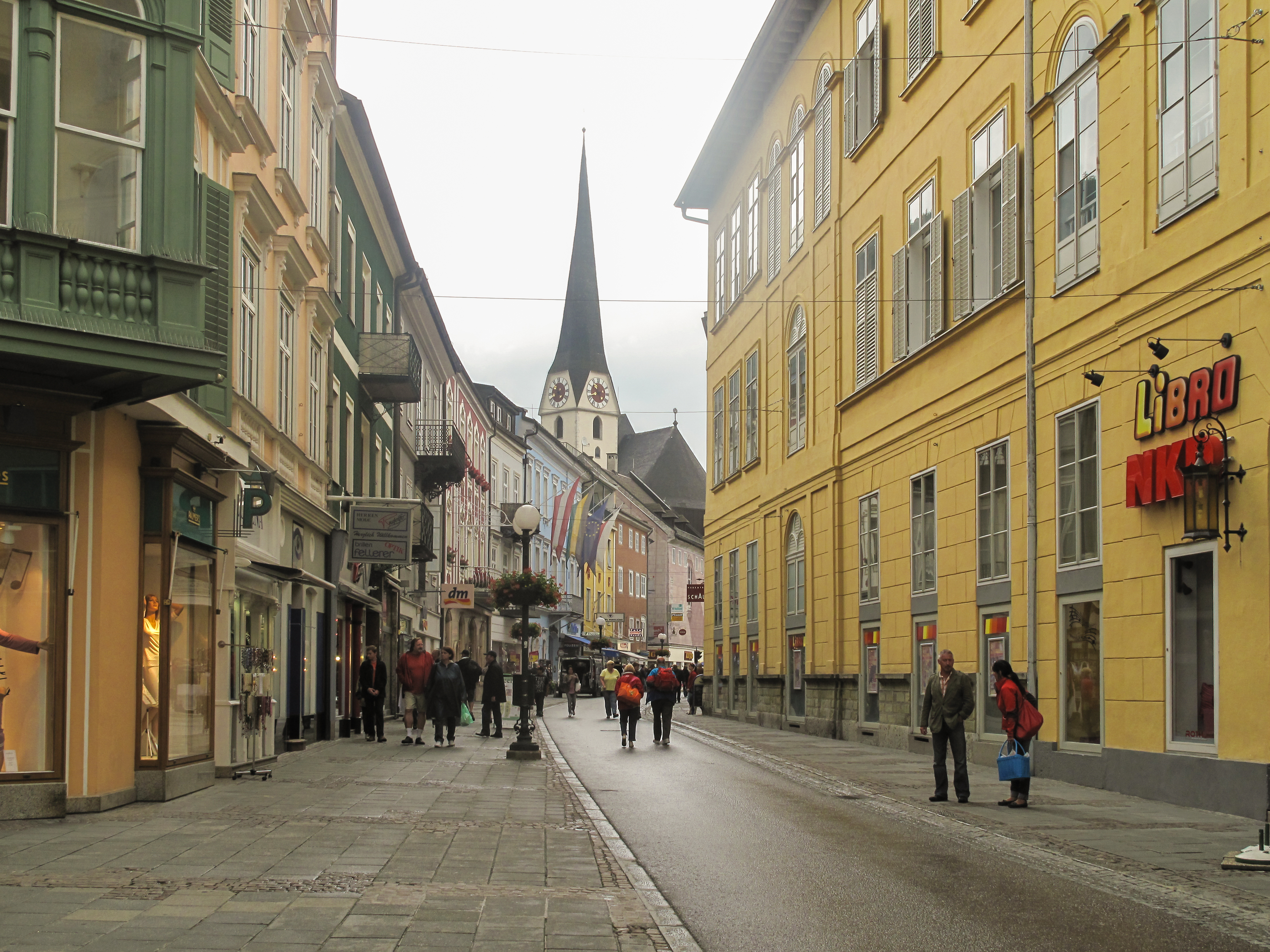 Bad Ischl, straatzicht met kerk